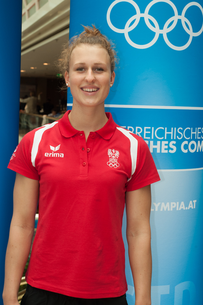 Einkleidung der Österreichischen Teilnehmer an den Olympischen Sommerspielen 2016 am 16./17. Juli 2016 in Wien. Bild zeigt Lena Kreundl.